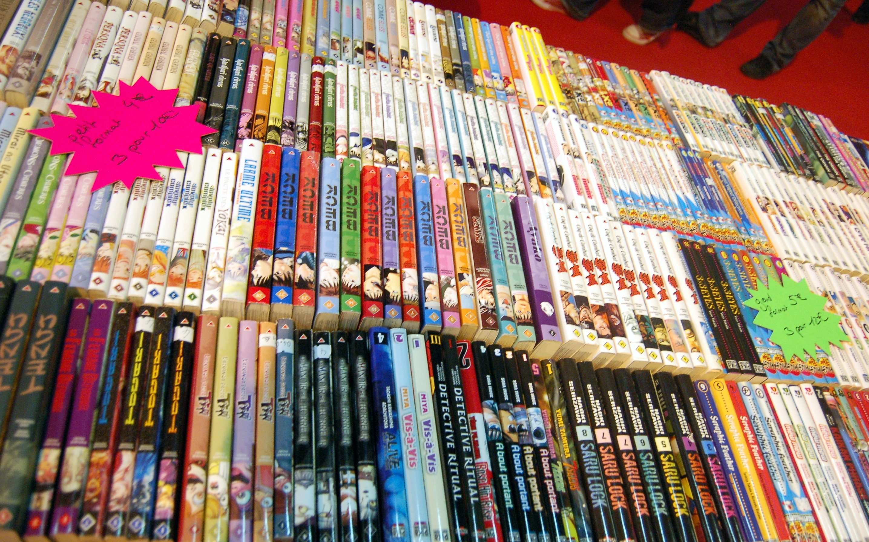 Convention de l'animation de l'EPITA 2009 - Stand magas